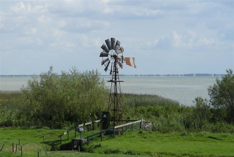 Windmotor bij Mirns